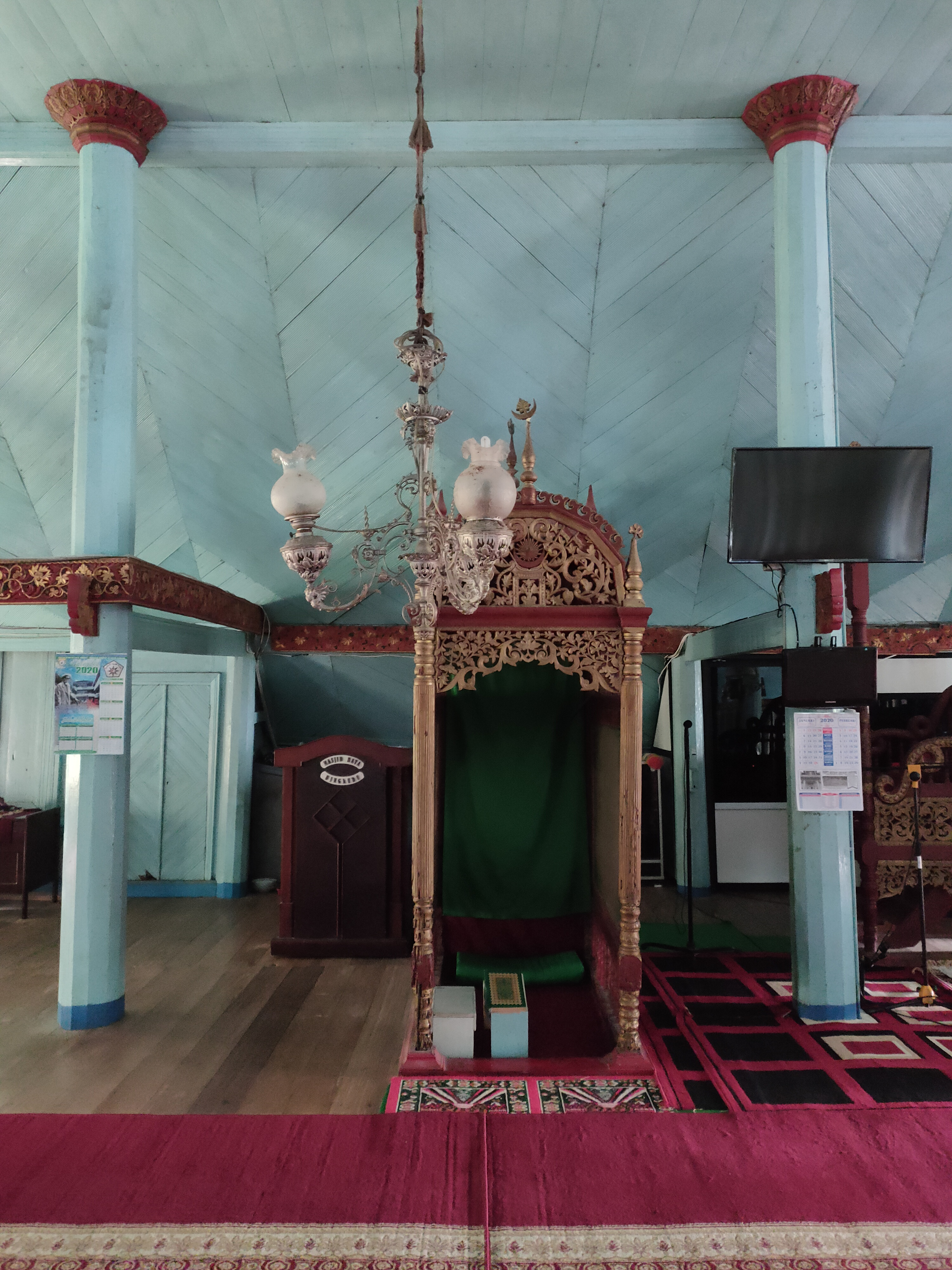 Masjid Bingkudu terletak di Jorong Bingkudu, Nagari Canduang Koto Laweh, Kecamatan Canduang, Kabupaten Agam, Sumatra Barat, Indonesia.